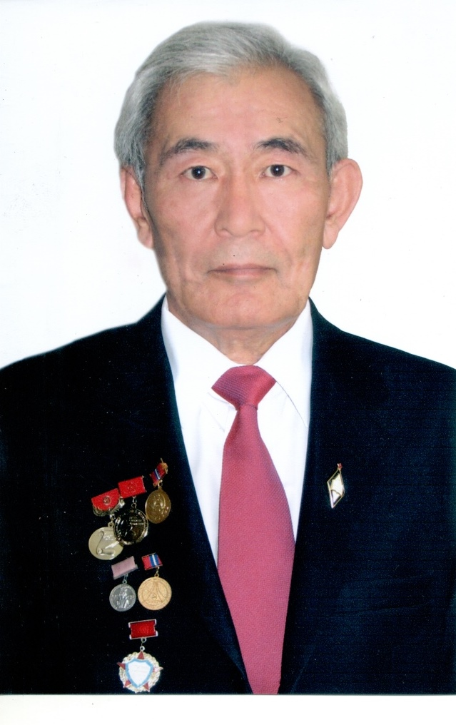 Профессор, кандидат технических наук Кыргызской Республики